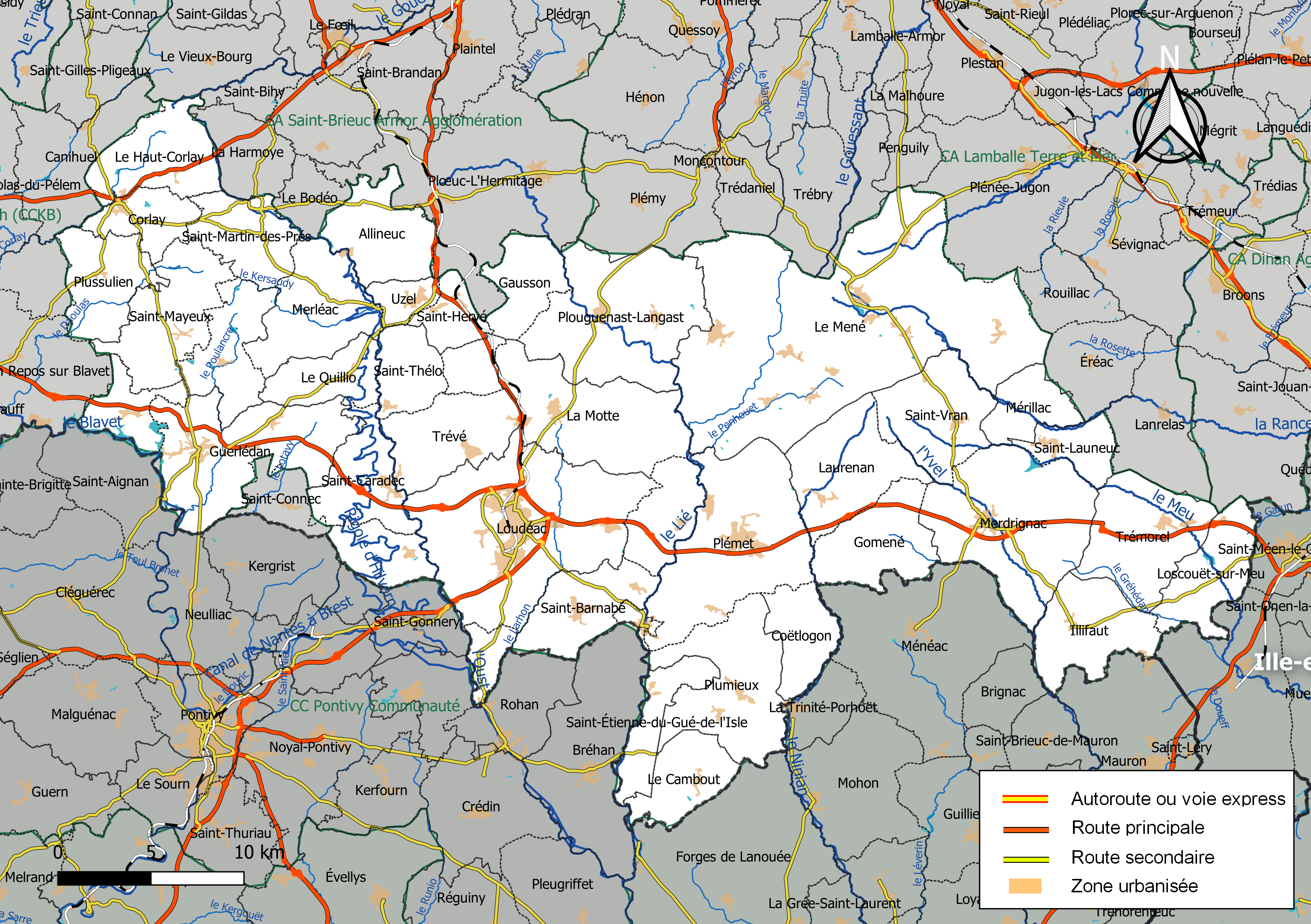 Carte géographique de la Communauté de communes Loudéac Communauté - Bretagne Centre, département des Côtes-d'Armor, France. Composition au 1er janvier 2019.